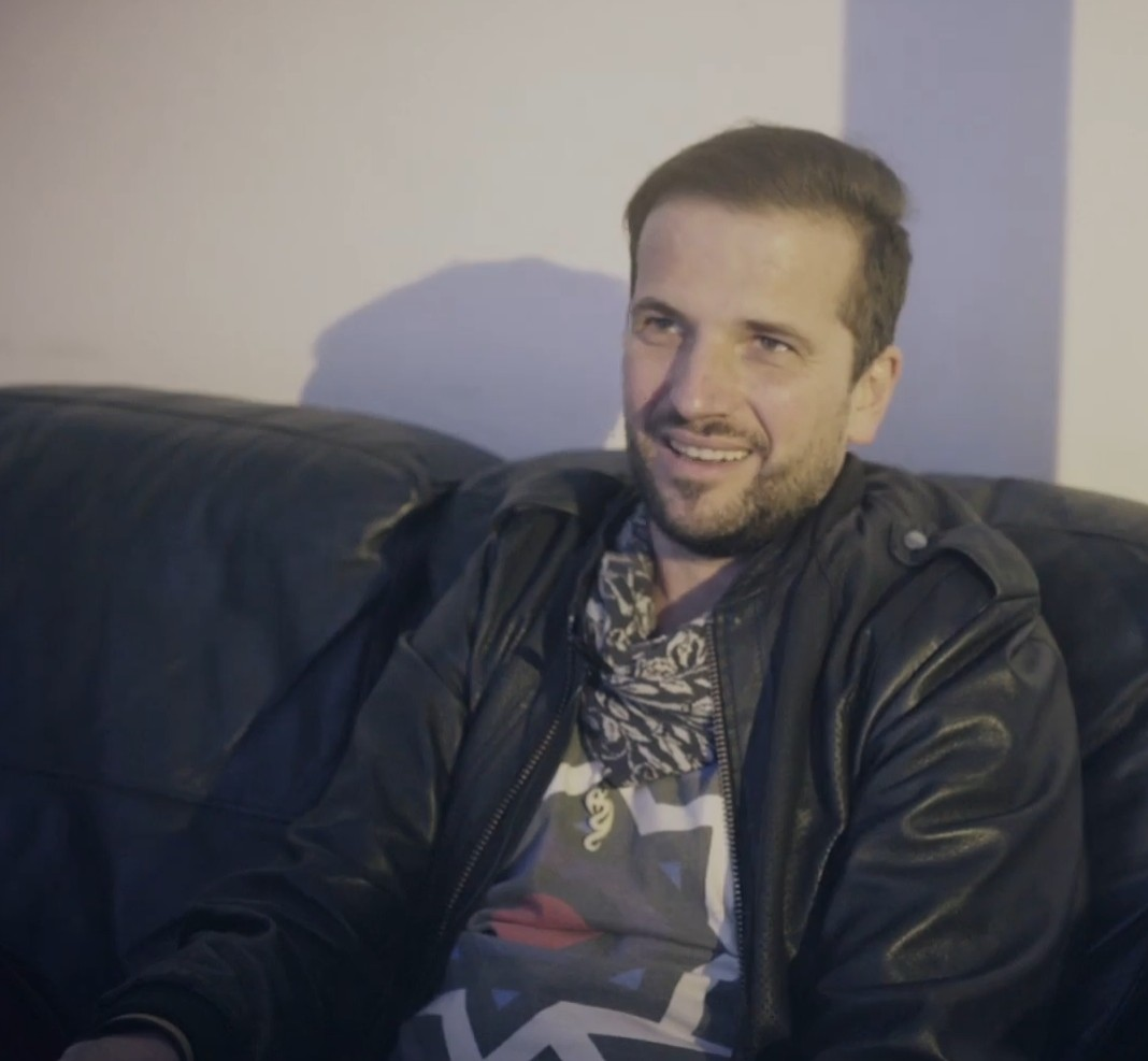 El pasado Jueves 14 de Julio, estuvimos conversando con el reconocido dj esloveno Valentino Kanzyani​ quién nos contó acerca sus inicios y de cómo ha sido el uso de distintos tipos de equipamiento a lo largo de su carrera como dj.